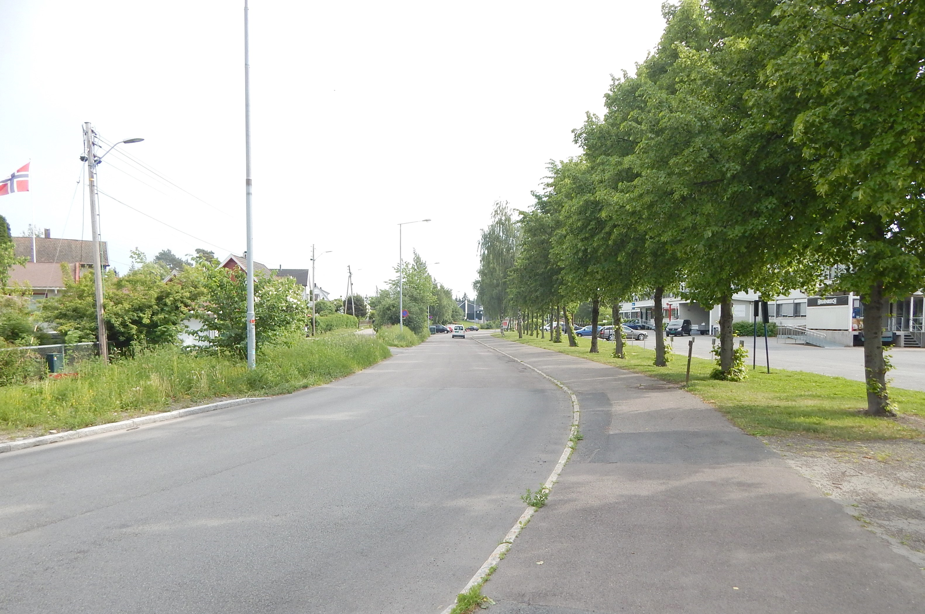 Nordøstenden av Sandstuveien